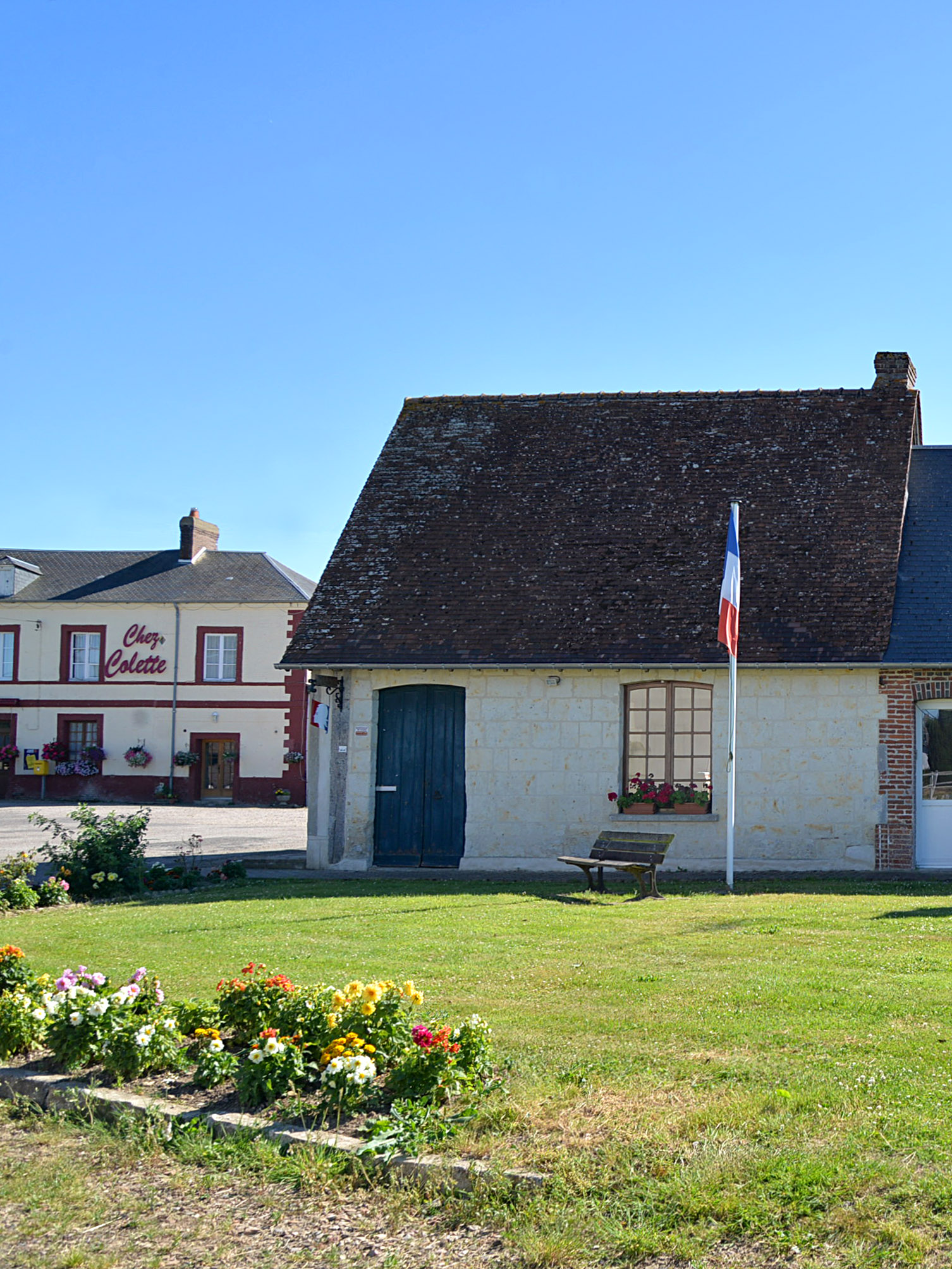 Cernay (Calvados)